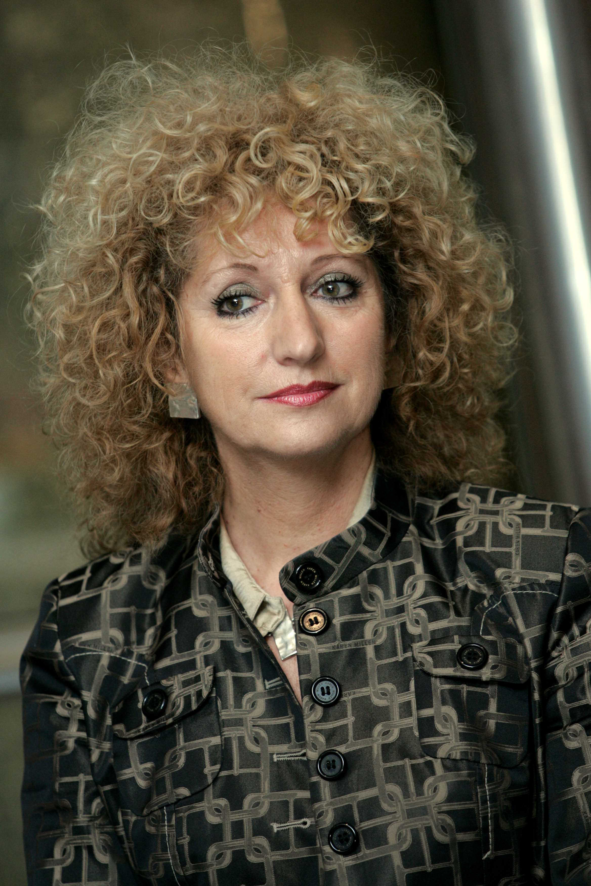 Photo de Bernadette Vergnaud député européen de la région ouest (France) transmise par son assistant parlementaire